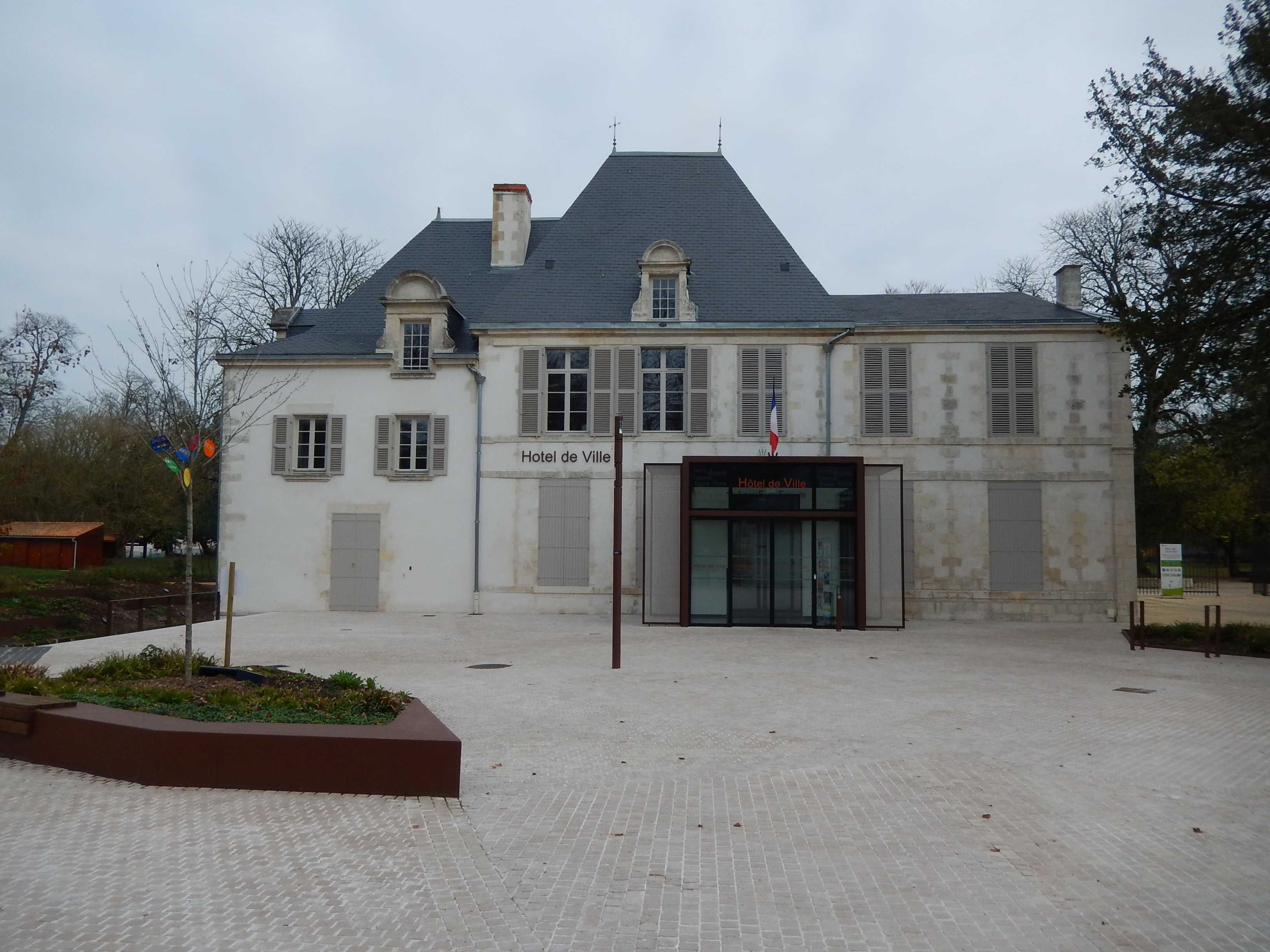 La mairie actuelle de Périgny (Charente-Maritime, France).